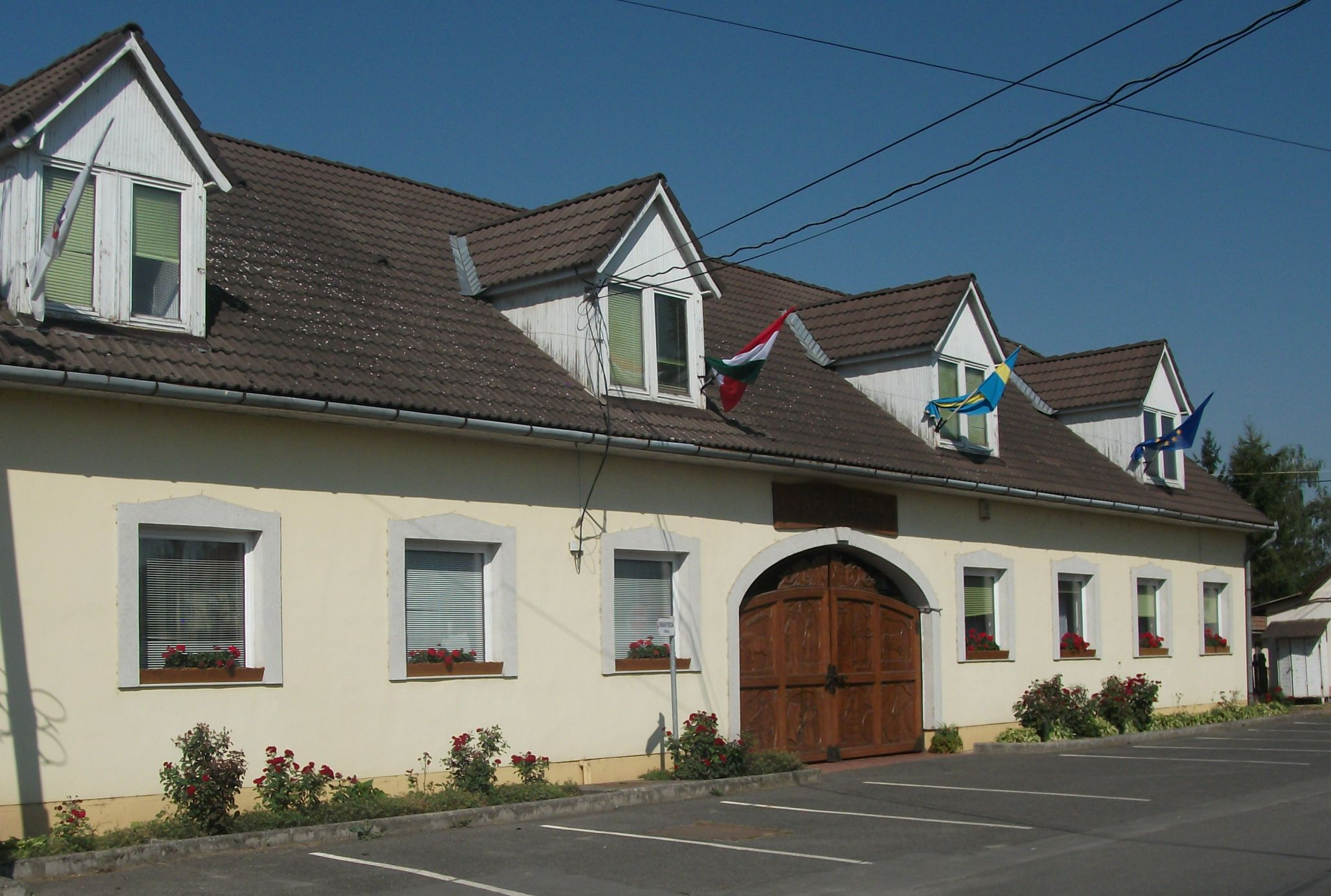 Cigánd Város Önkormányzati épülete.